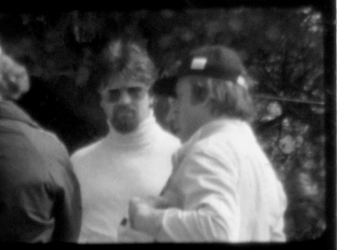 Kadr z amatorskiego filmu 8 mm. 17. 06. 1979 r. II Targowy Wyścig Samochodowy na Torze Poznań. Andrzej Jaroszewicz przed pokazową jazdą bolidu Formuły 1 ( Wolf WR5 z silnikiem Ford Cosworth DFV 2989 ccm ) w rozmowie z Maciejem Stawowiakiem.